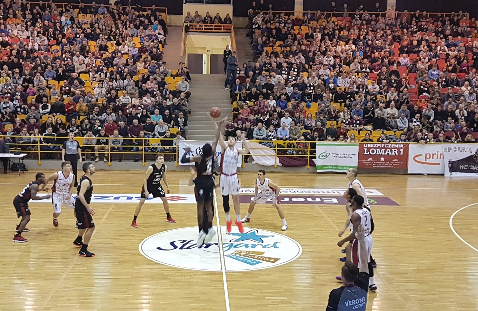 Spójnia-Start Lublin (03.01.2019)